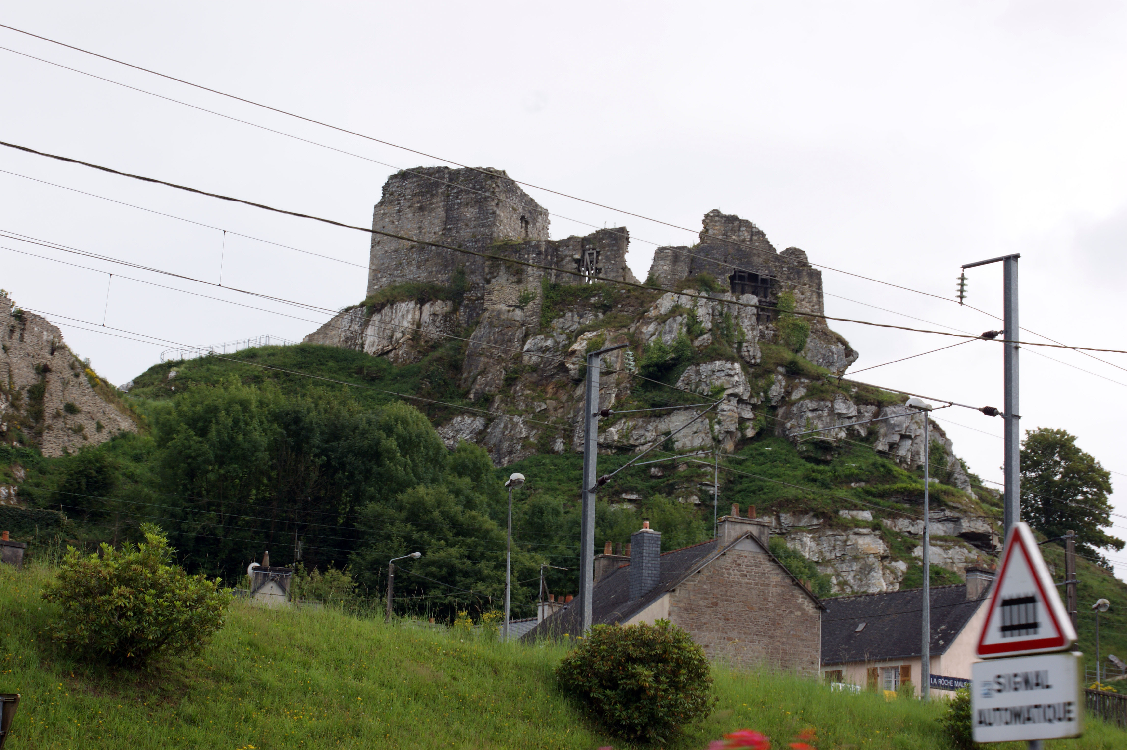 La-Roche-Maurice au dessus de la ligne de chemin de fer.